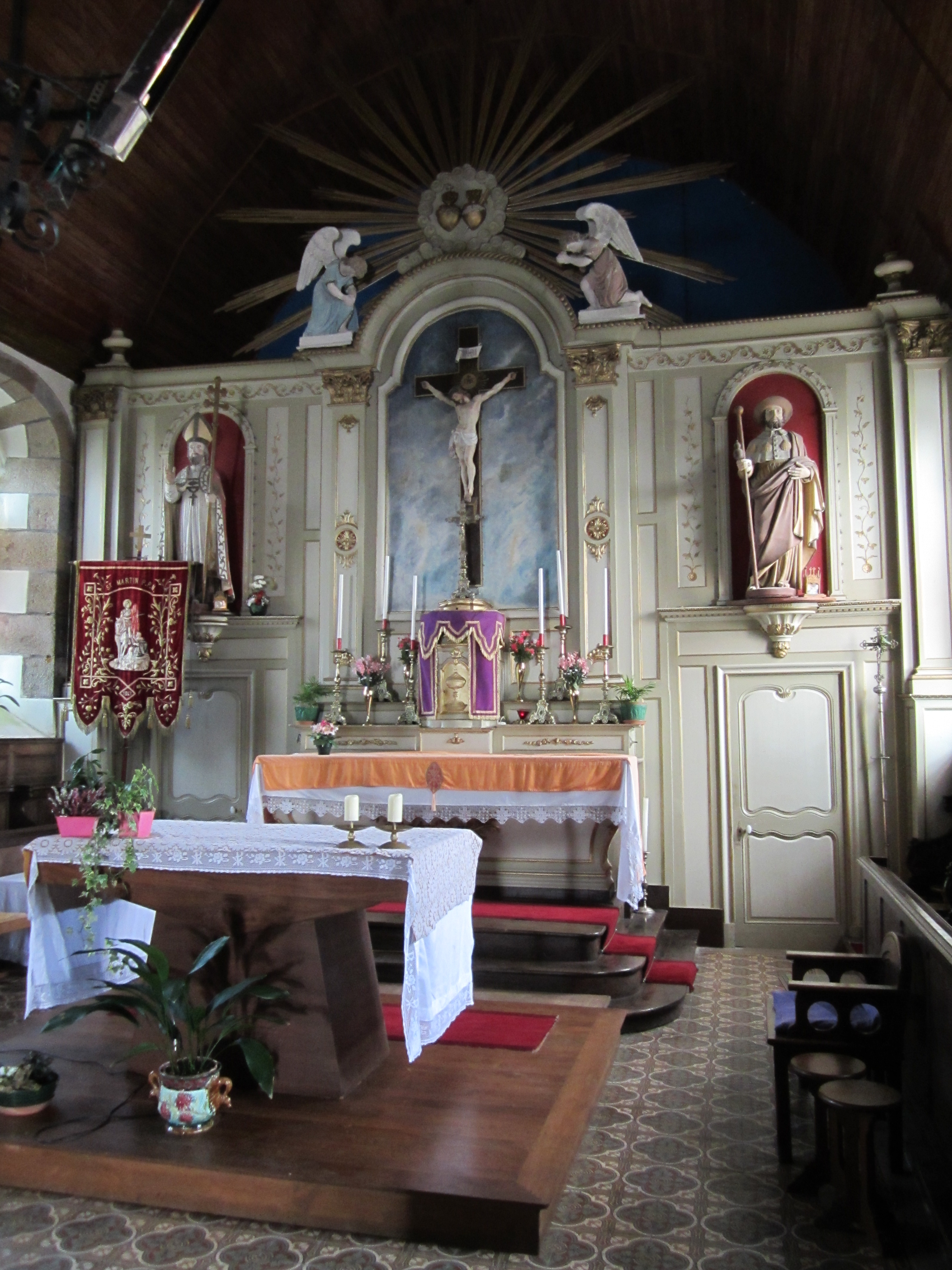 Saint-Martin-le-Bouillant, Manche